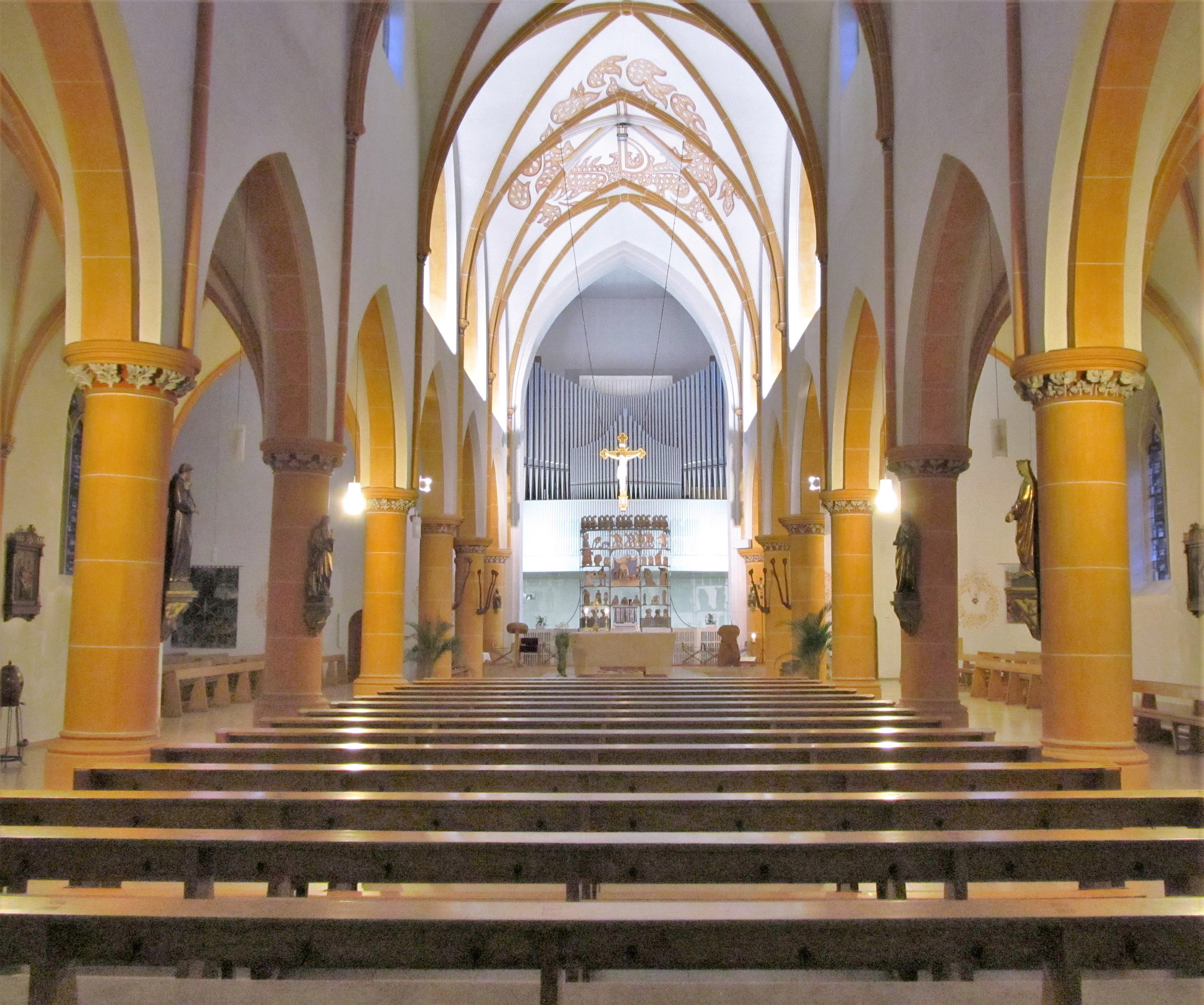 Blick ins Innere der katholischen Liebfrauenkirche in Püttlingen, Saarland